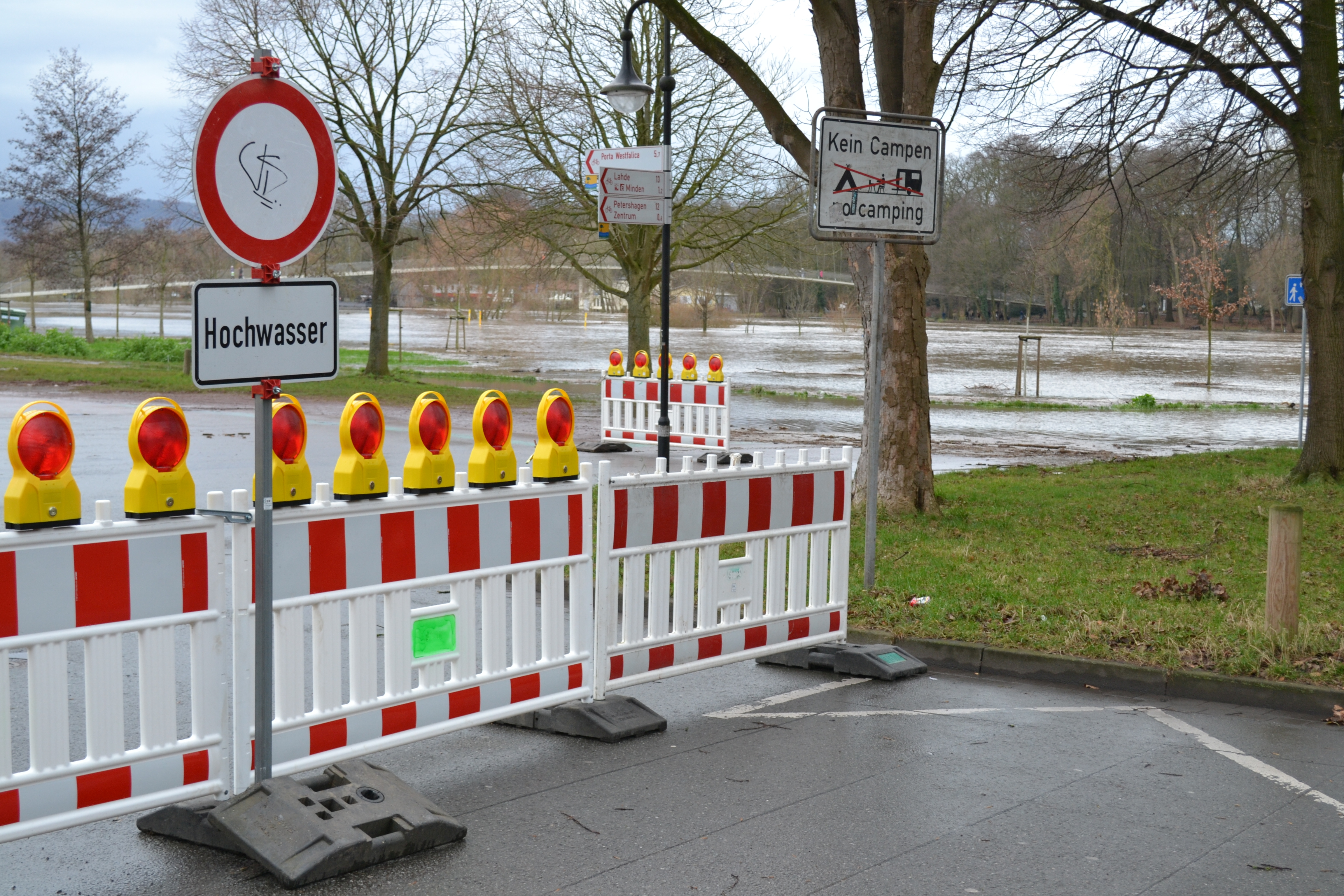 Weserhochwasser in der ostwestfälischen Stadt Minden, hier Blick vom Brückenkopf auf die Weser